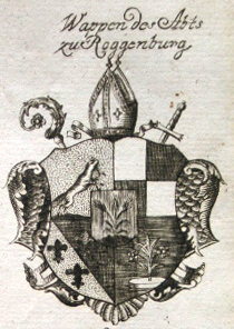 Wappen des Abts zu Roggenburg, Kupferstich, 1767, in: "Der durchlauchtigen Welt vollständiges Wappenbuch".